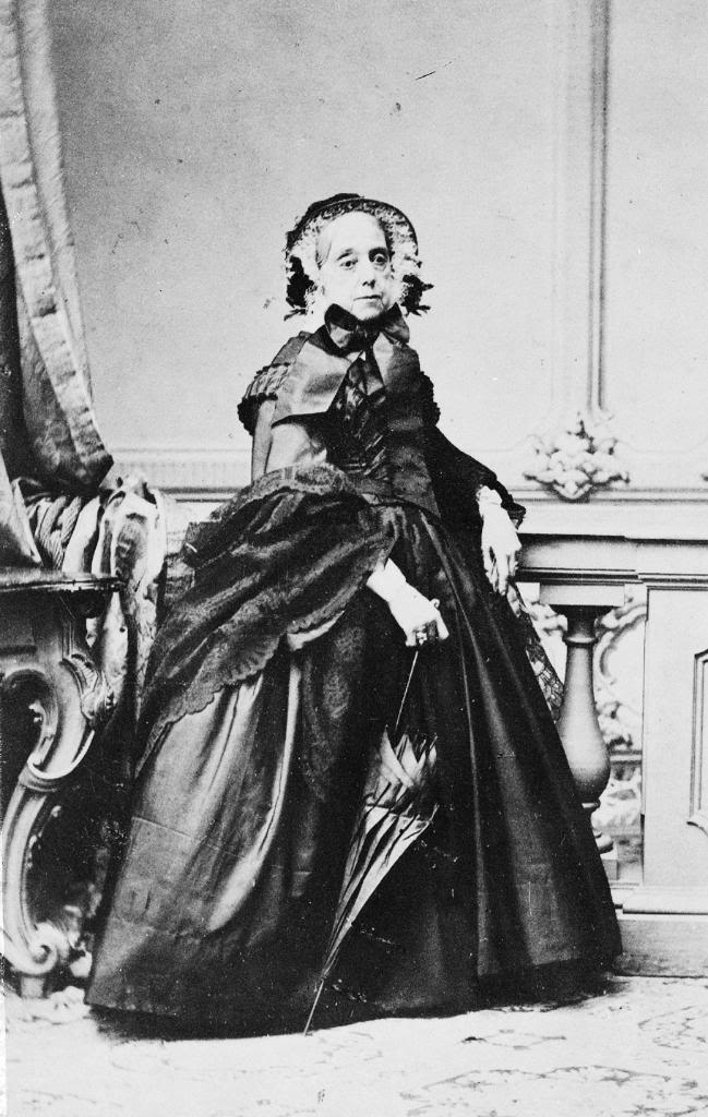 Therese, Infantin von Portugal Fürstin von Beira (1793 - 1874), Altersbildnis.